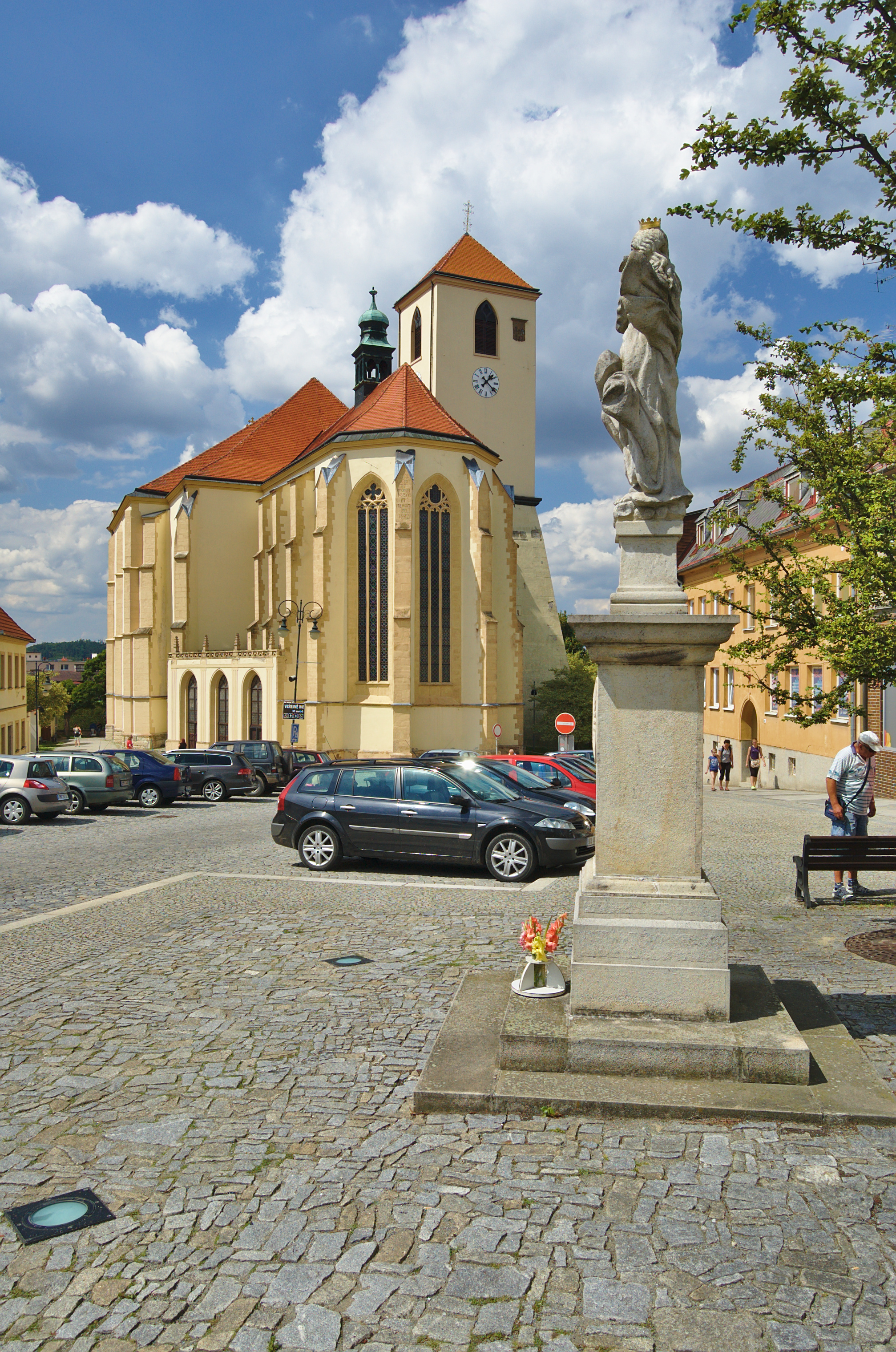 Kostel svatého Jakuba Staršího, Boskovice, okres Blansko